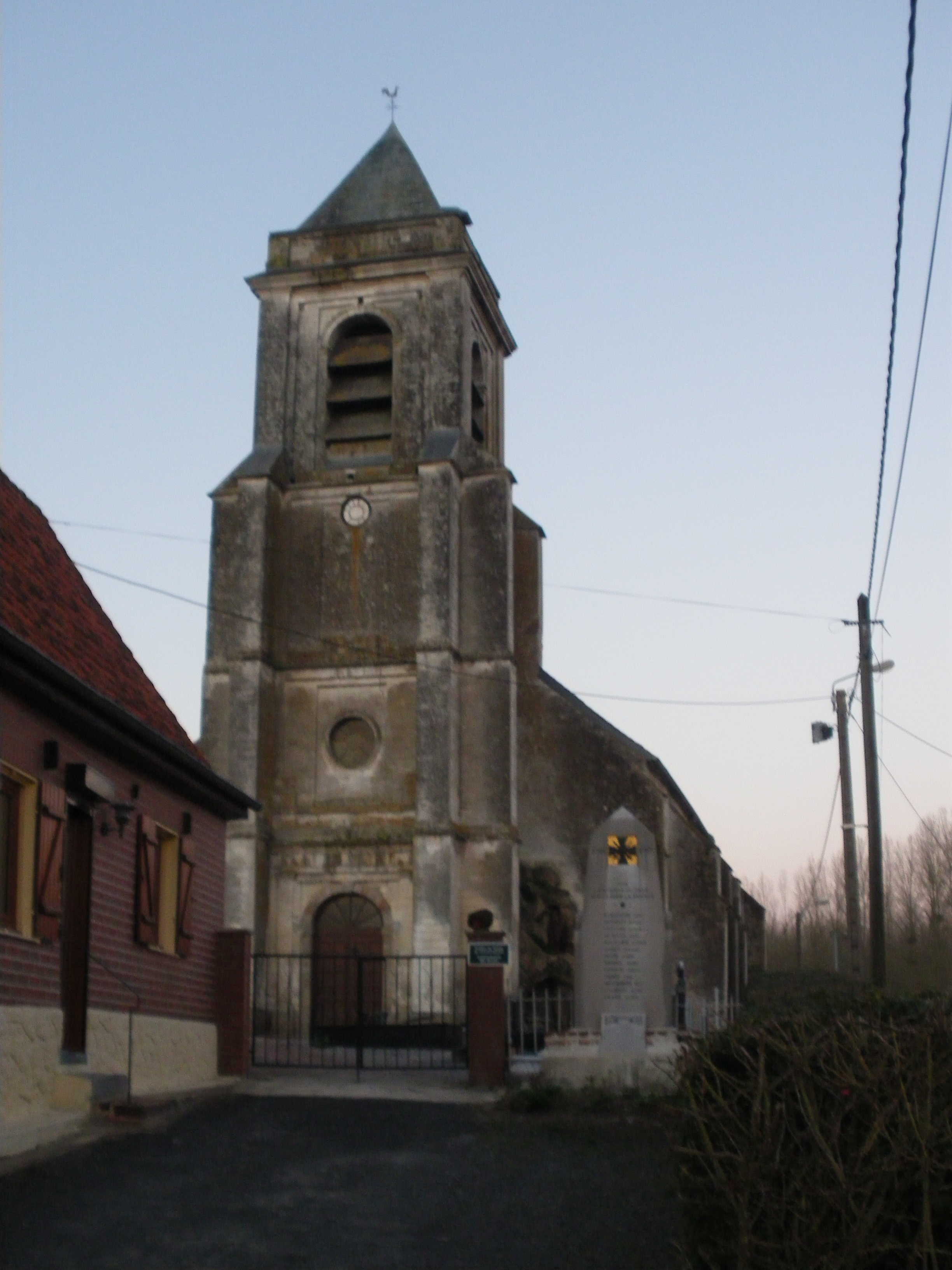 Vue de l'église Saint-Martin et du monument aux morts de Caumont.